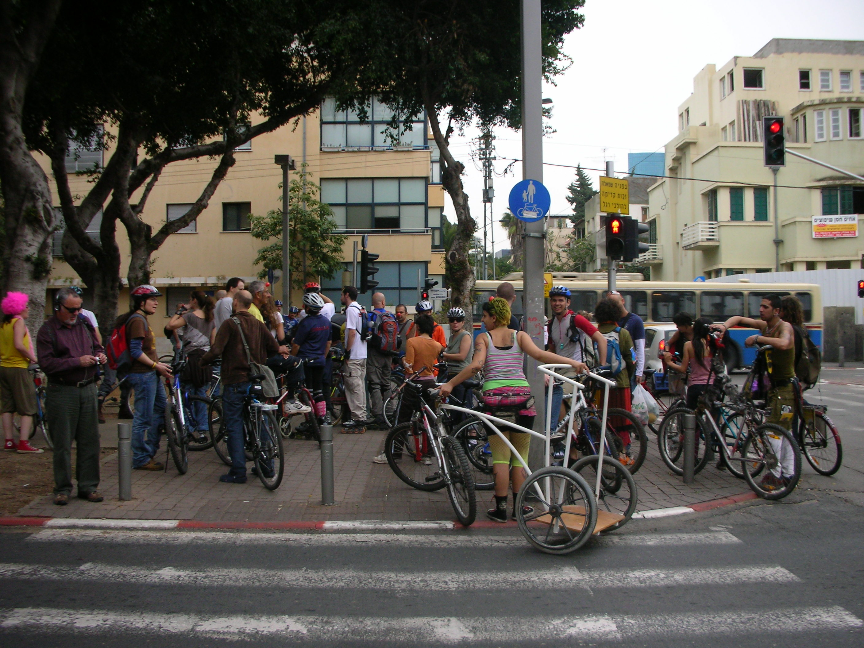 Critical mass in tel aviv 23.2.07